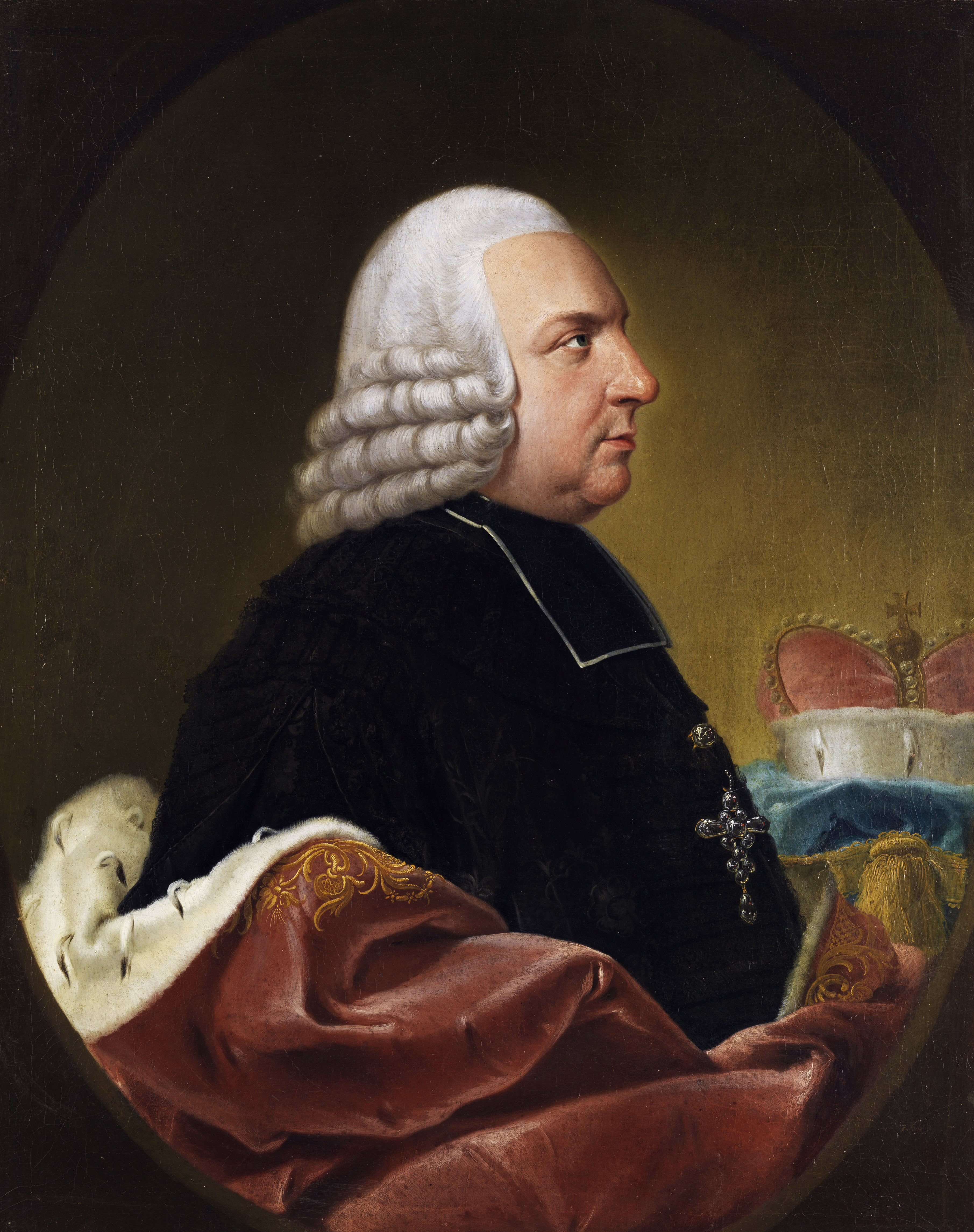 Fürstbischof Lothar Franz von Schönborn (1655–1729). Öl auf Leinwand. 88 x 70 cm. (Beschreibung laut Auktionshaus Hampel. Dort allerdings als "Fürstbischof von Würzburg" angegeben, der er nie war. Identifizierung daher fragwürdig.)